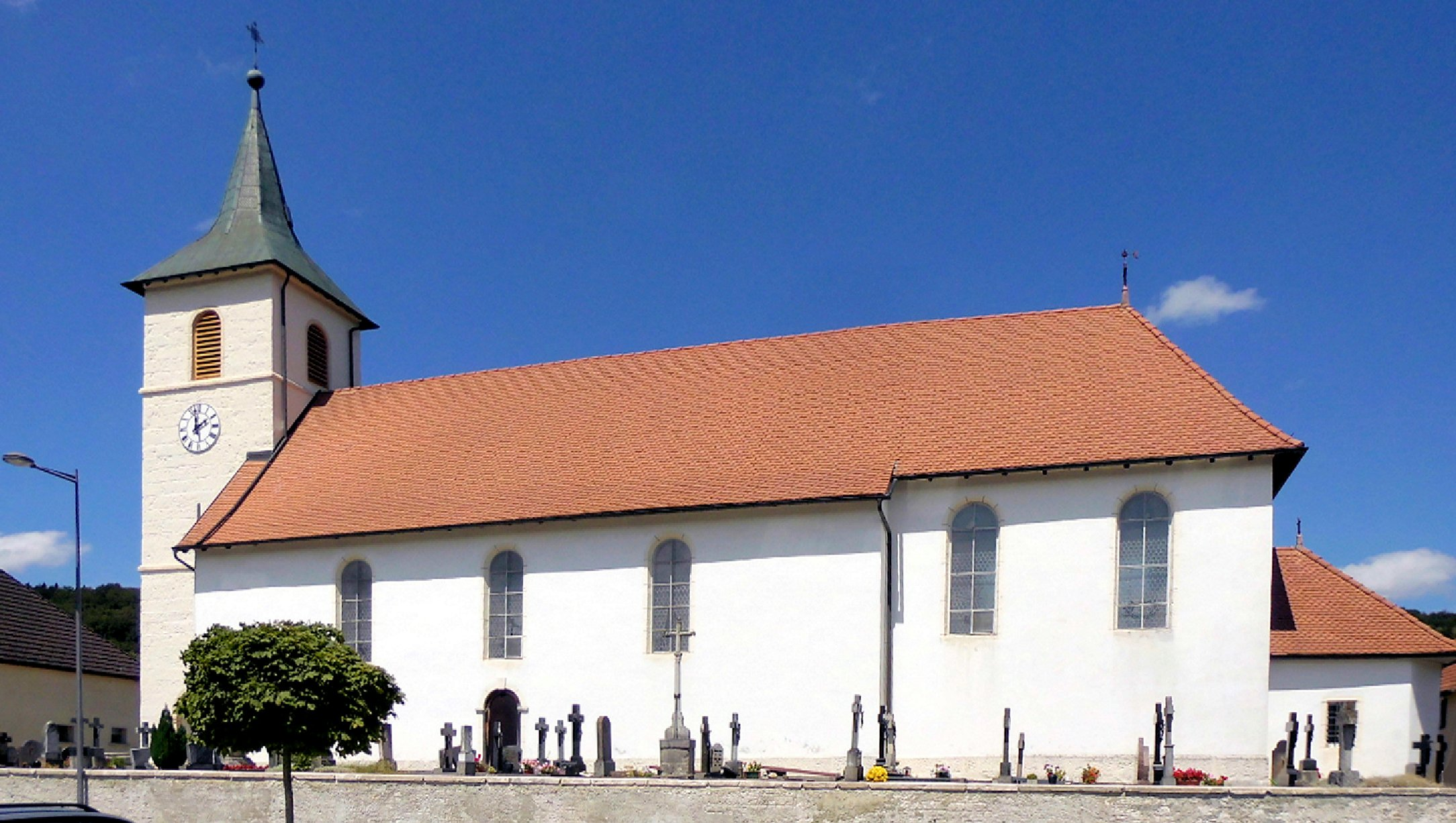 L'église Saint-Germain de Damvant, Suisse, côté sud